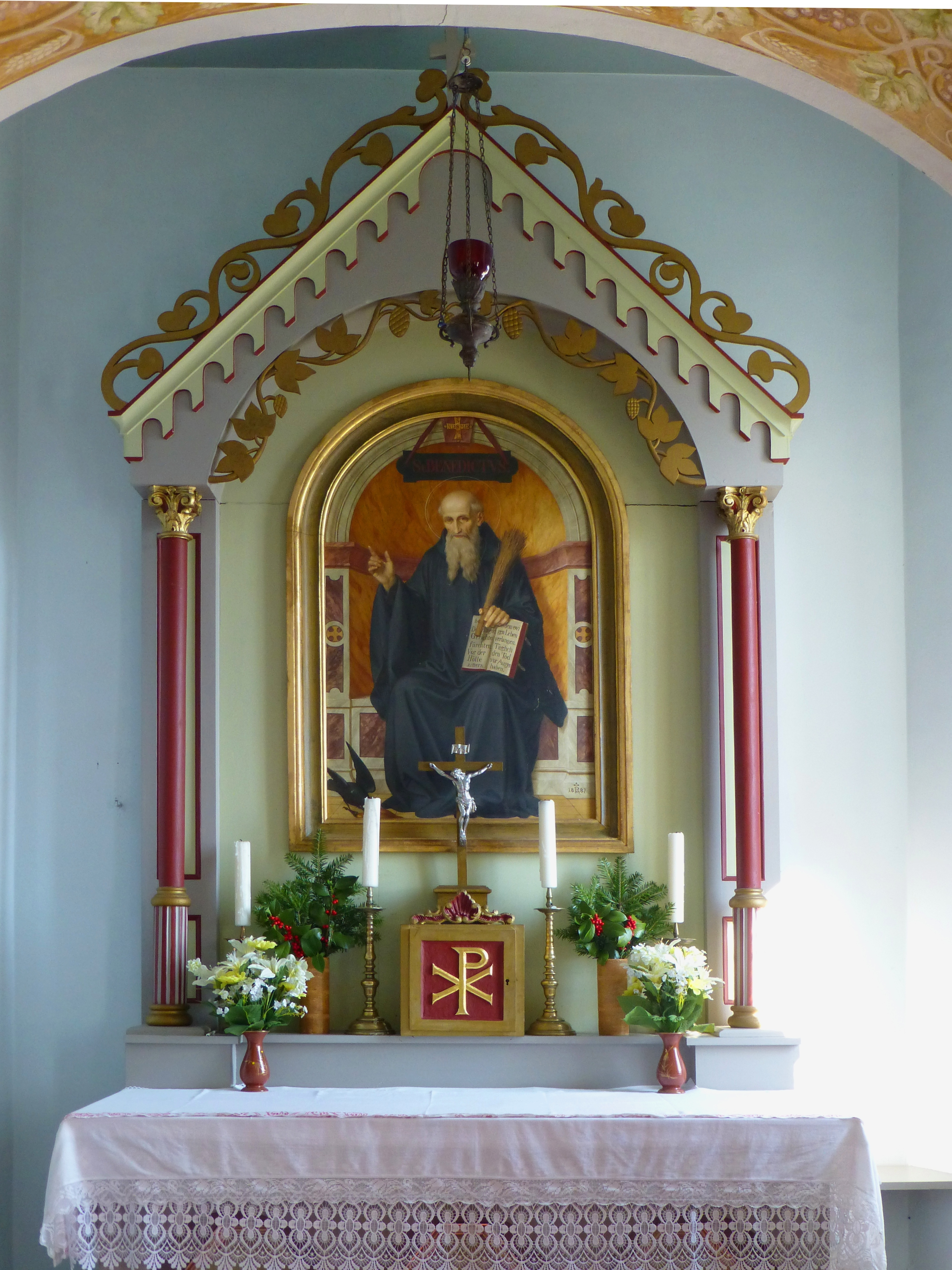 Altar der Kapelle in der Dünserberger Parzelle Bischa, geweiht dem Heiligen Benedikt - Inschrift: "D(en) Tag des Gerichtes fürchten. Vor der Hölle zittern. (Nach) dem ewigen Leben verlangen. Täglich den Tod vor Augen haben." (Regula Benedicti 4,44–47)